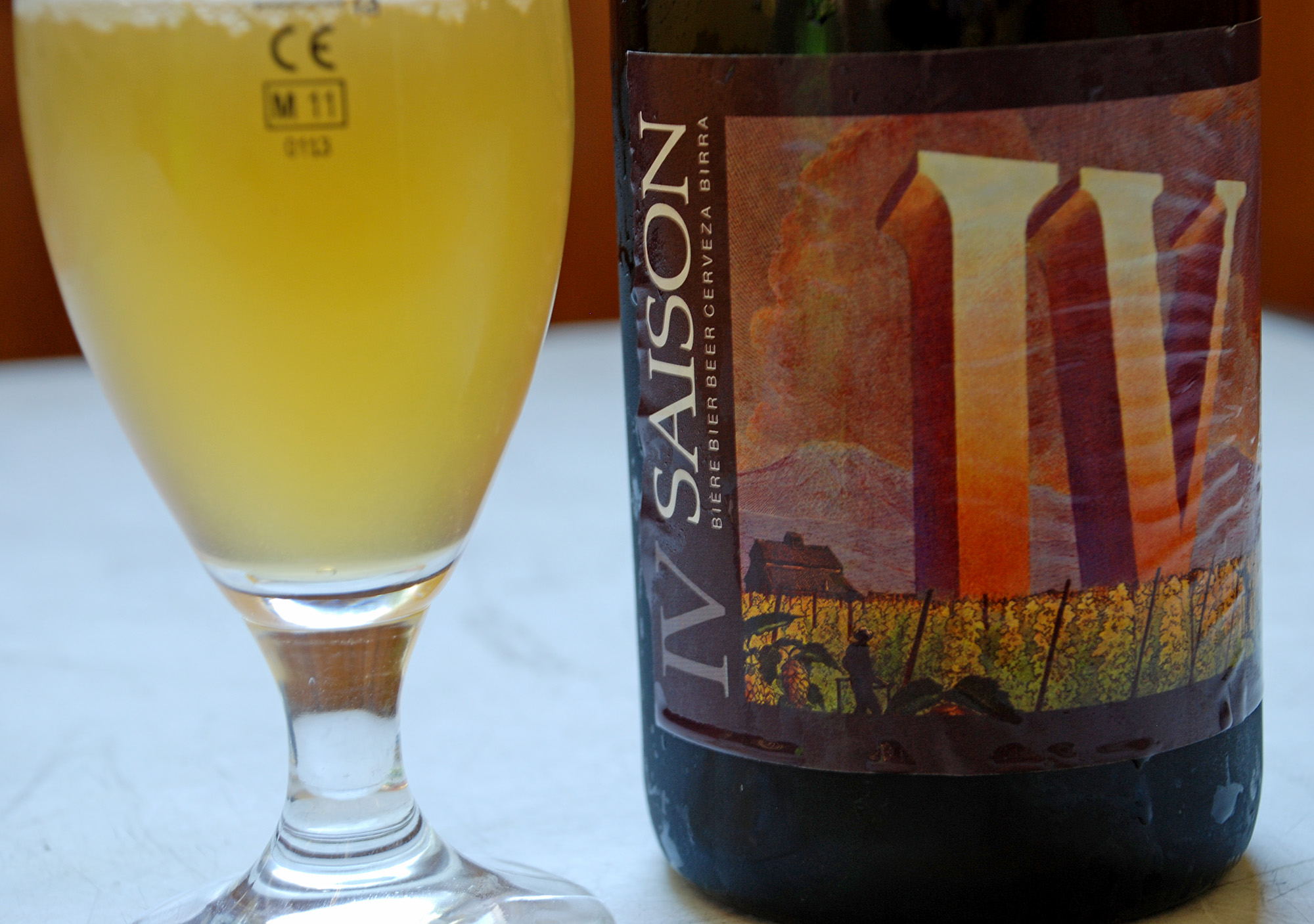 IV Saison, Belgisch bier